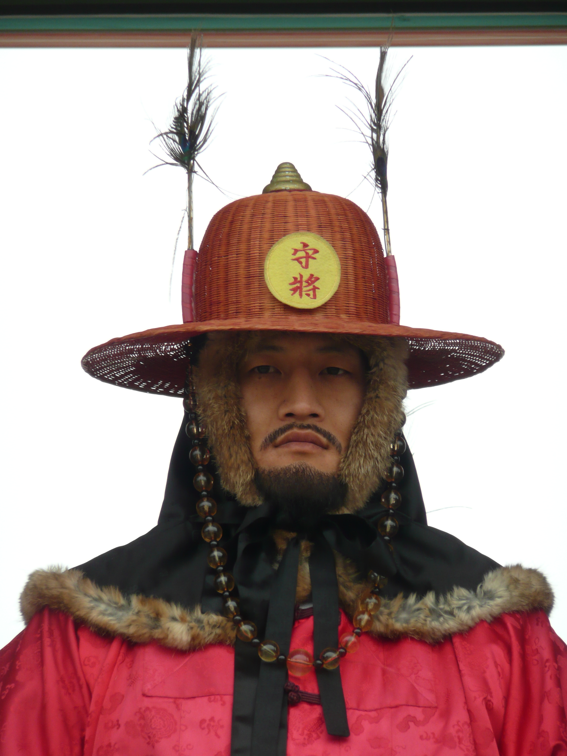 Portrait d'un garde, me fait un peu penser à mathieu madec